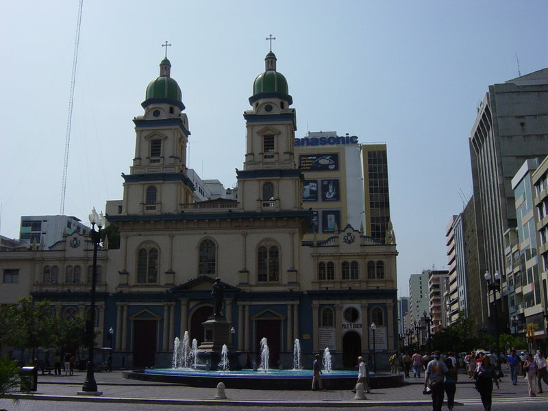 Gemaakt door Duitse gebruiker User:Mazbln (Martin Zeise) in dec. 2004 en op wiki commons geplaatst